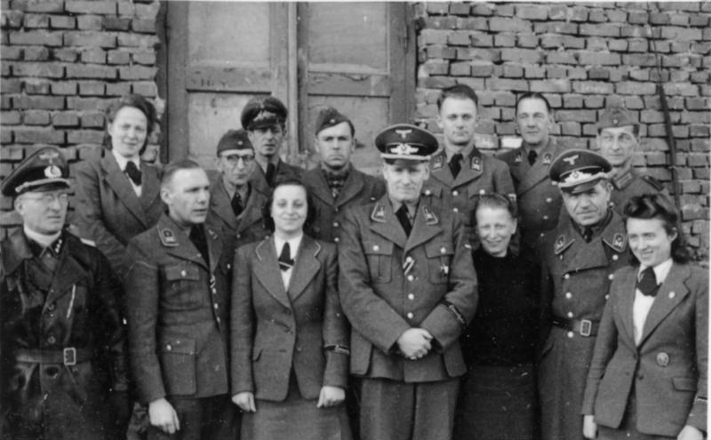 Einsatzstab Reichsleiter Rosenberg für die besetzten Gebiete, Hauptarbeitsgruppe Ostland. Film 77 - 24 Wilna, Minsk. Photo Dr. Nerling, März 1943 Gruppenaufnahme vor der Dienststelle in Minsk